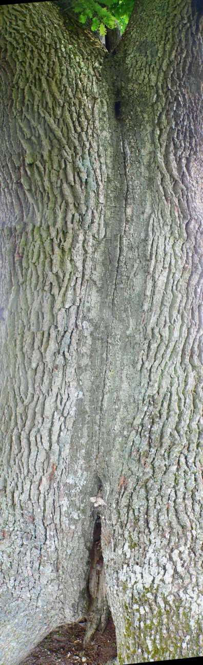 Naturdenkmal Momarter Eiche (Bad König, Odenwald) - Blitzrinne an der Südseite